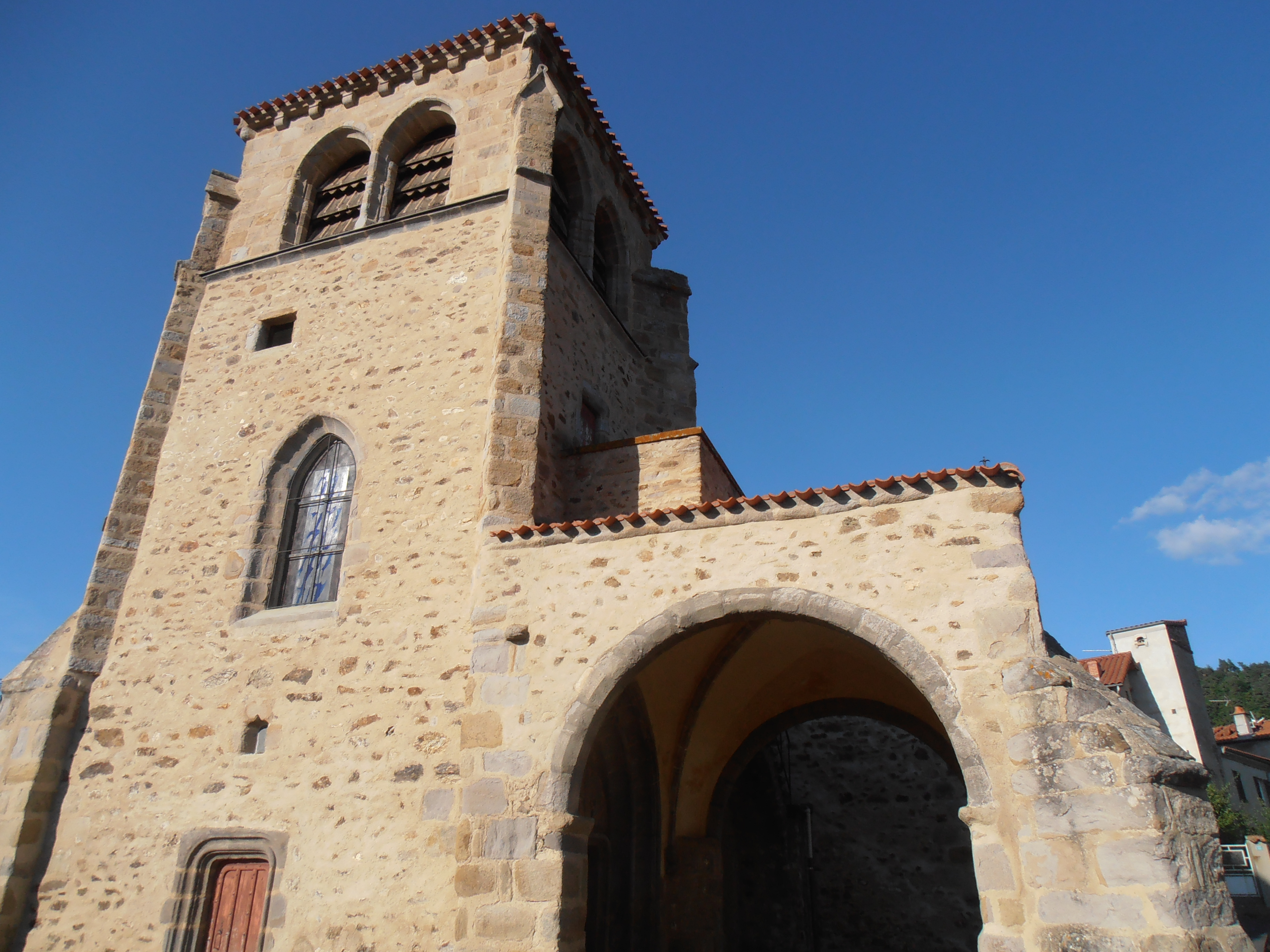 Église Saint-Mary de Vézézoux (Inscrit) .